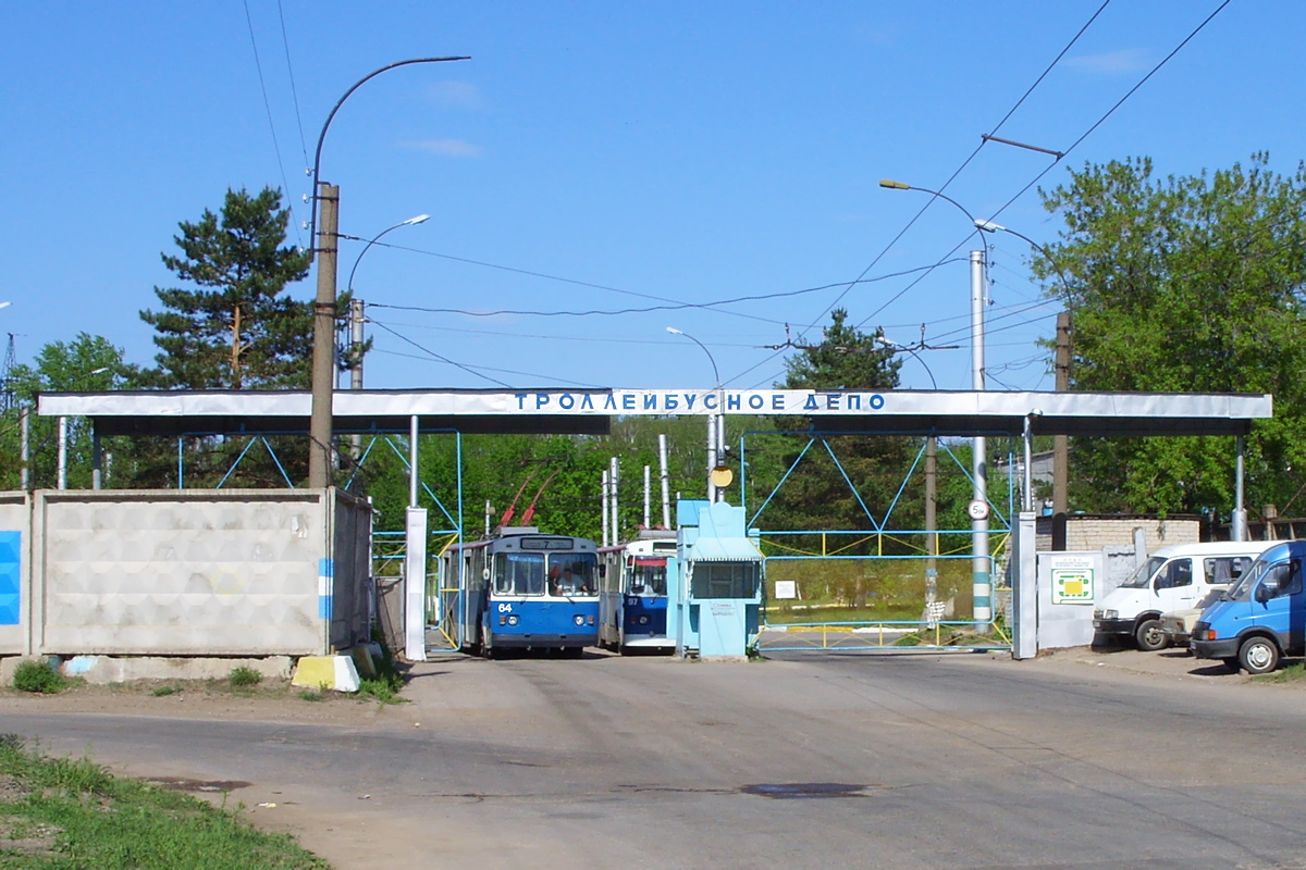 Ворота Заволжского троллейбусного депо №3 г. Ульяновск